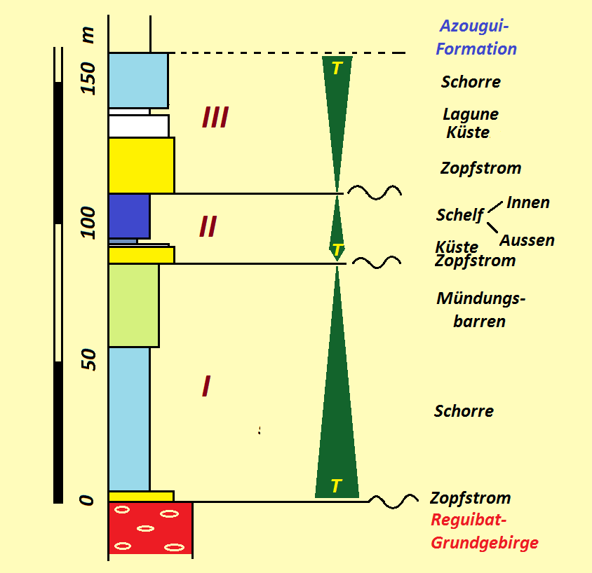 Stratigraphie der Agueni-Formation mit Mächtigkeiten, Sequenzen und Fazies. Die Meeresspiegelentwicklung ist schematisiert, T steht für Transgression.